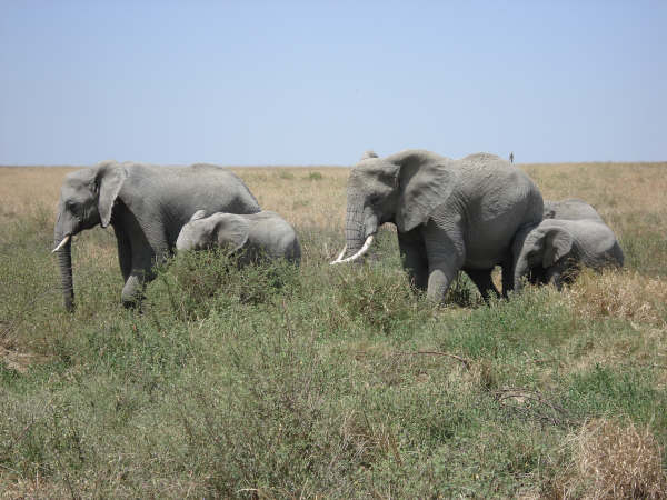 Loxodonta africana in Tanzania